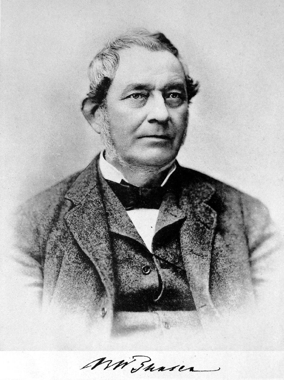 Robert Bunsen (* 30. März 1811 in Göttingen; † 16. August 1899 in Heidelberg)